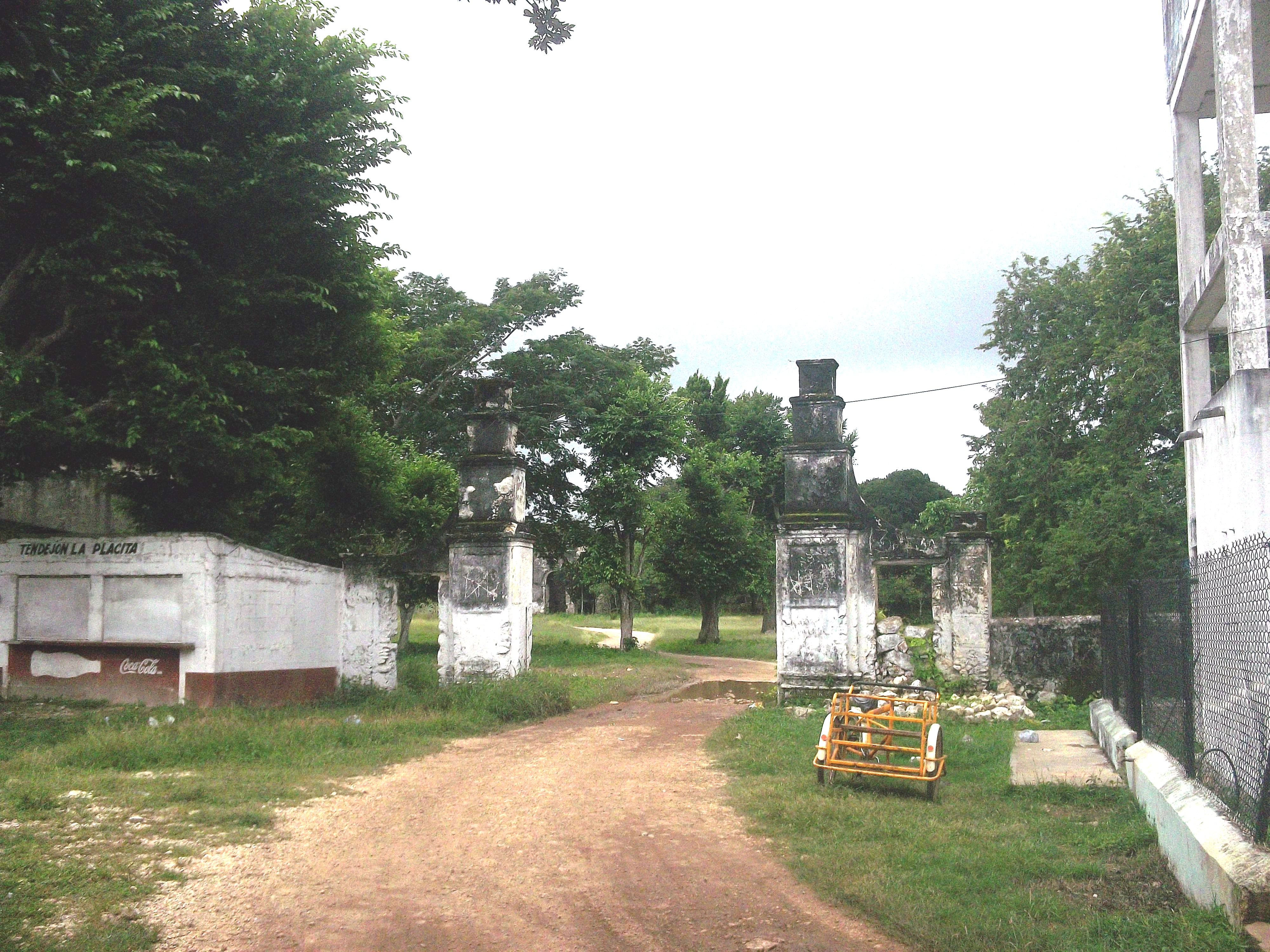 Hacienda de Eknakán, Yucatán.